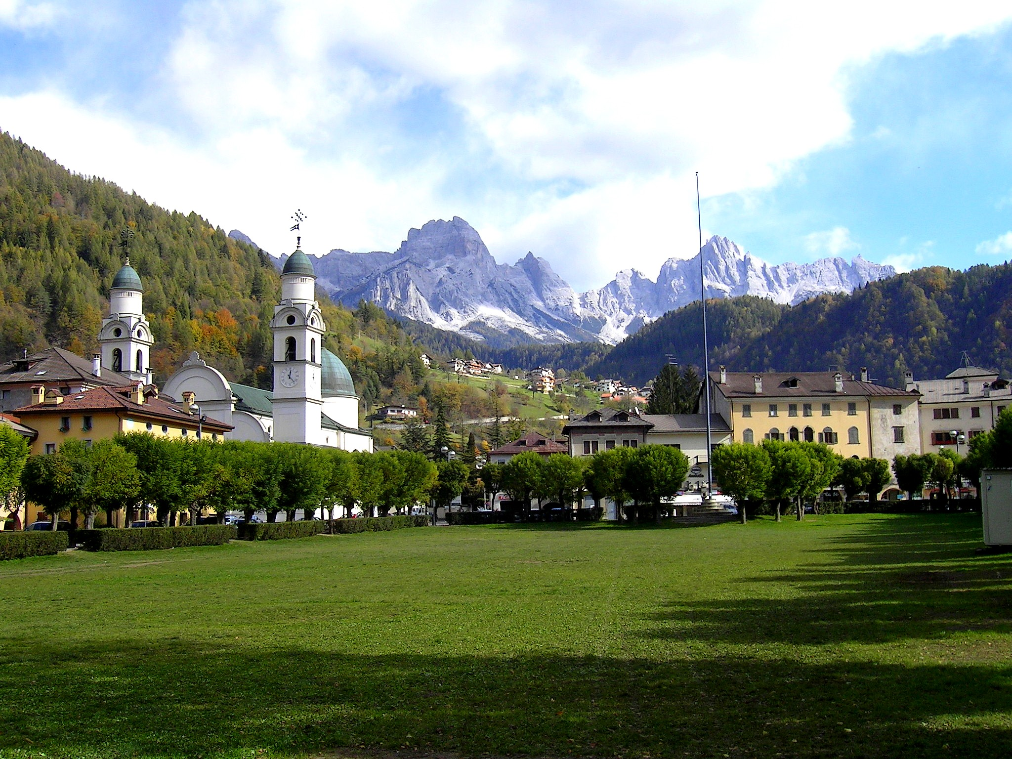 Il centro di Agordo, in primo piano il "Broi"